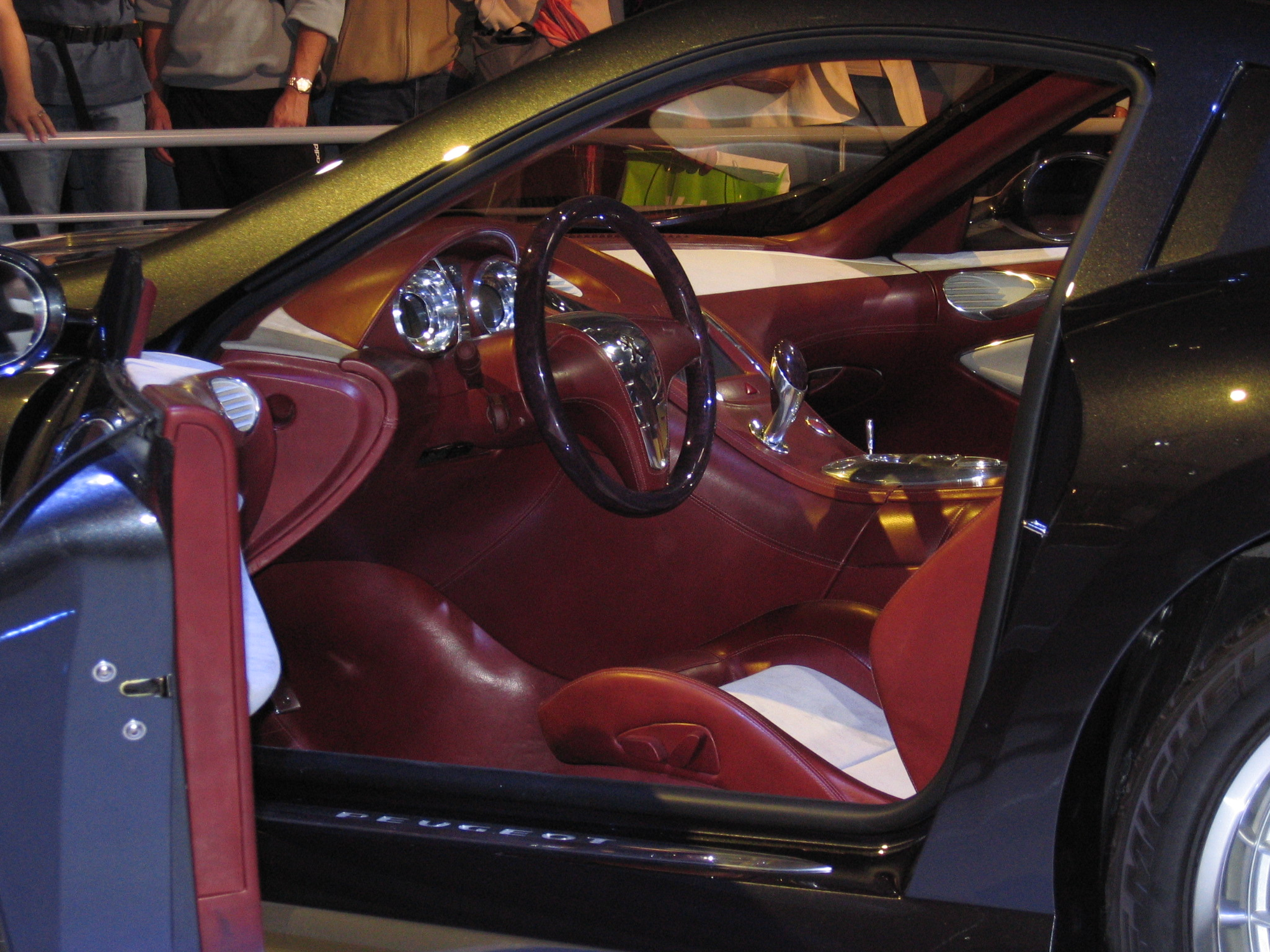 Peugeot 907 (Parijs 2004). Eigen werk, PD.